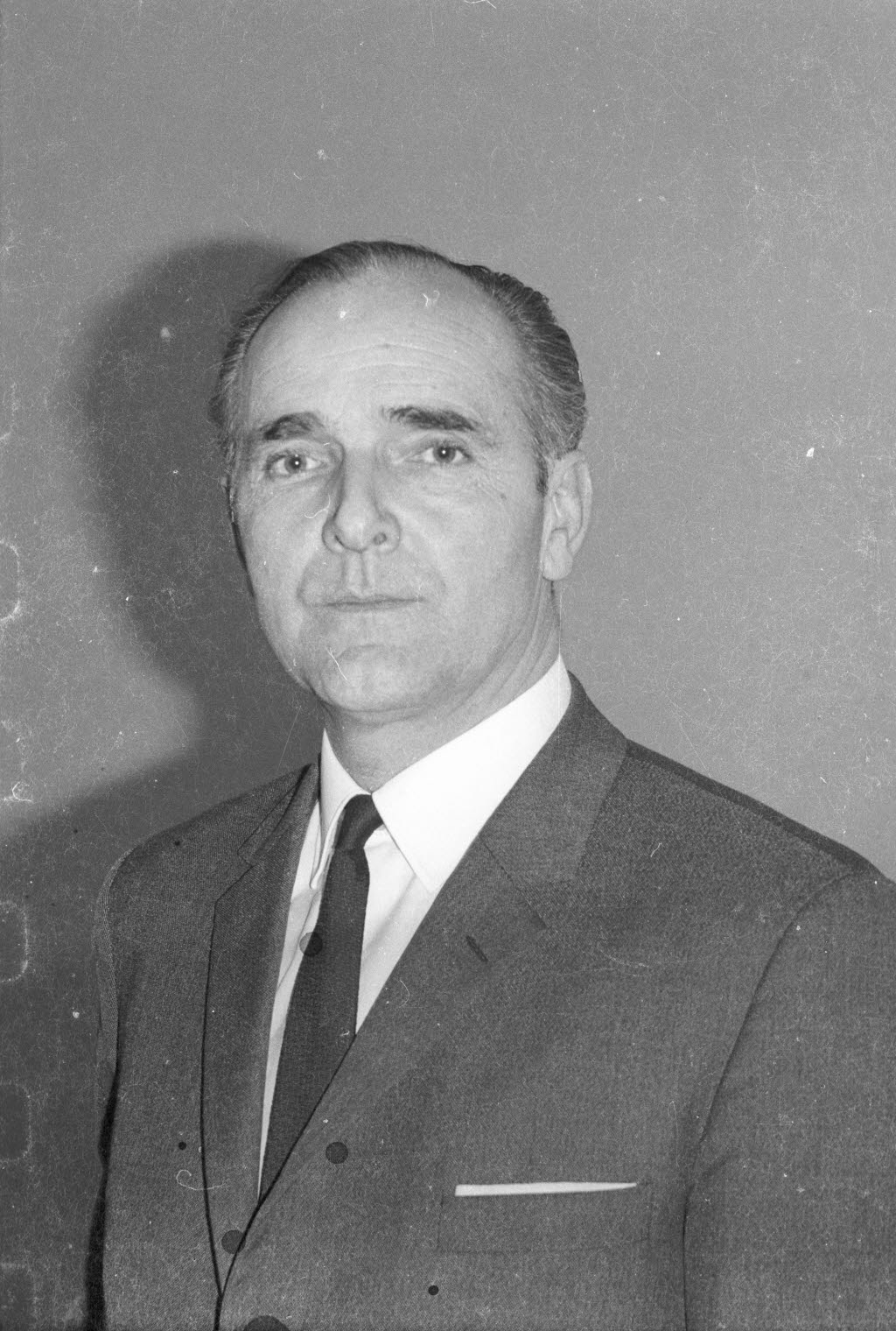 Ordinarius für Pflanzenernährung und Bodenkunde an der Christian-Albrechts-Universität (CAU). Referent der Kieler Universitätstage 1968.